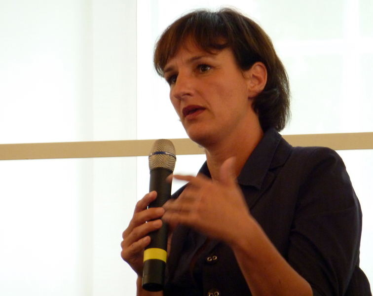 Marianne Grosse, Beigeordnete Dezernentin für Bauen, Denkmalpflege und Kultur in Mainz, während einer Podiumsdiskussion in der Mainzer Staatskanzlei.